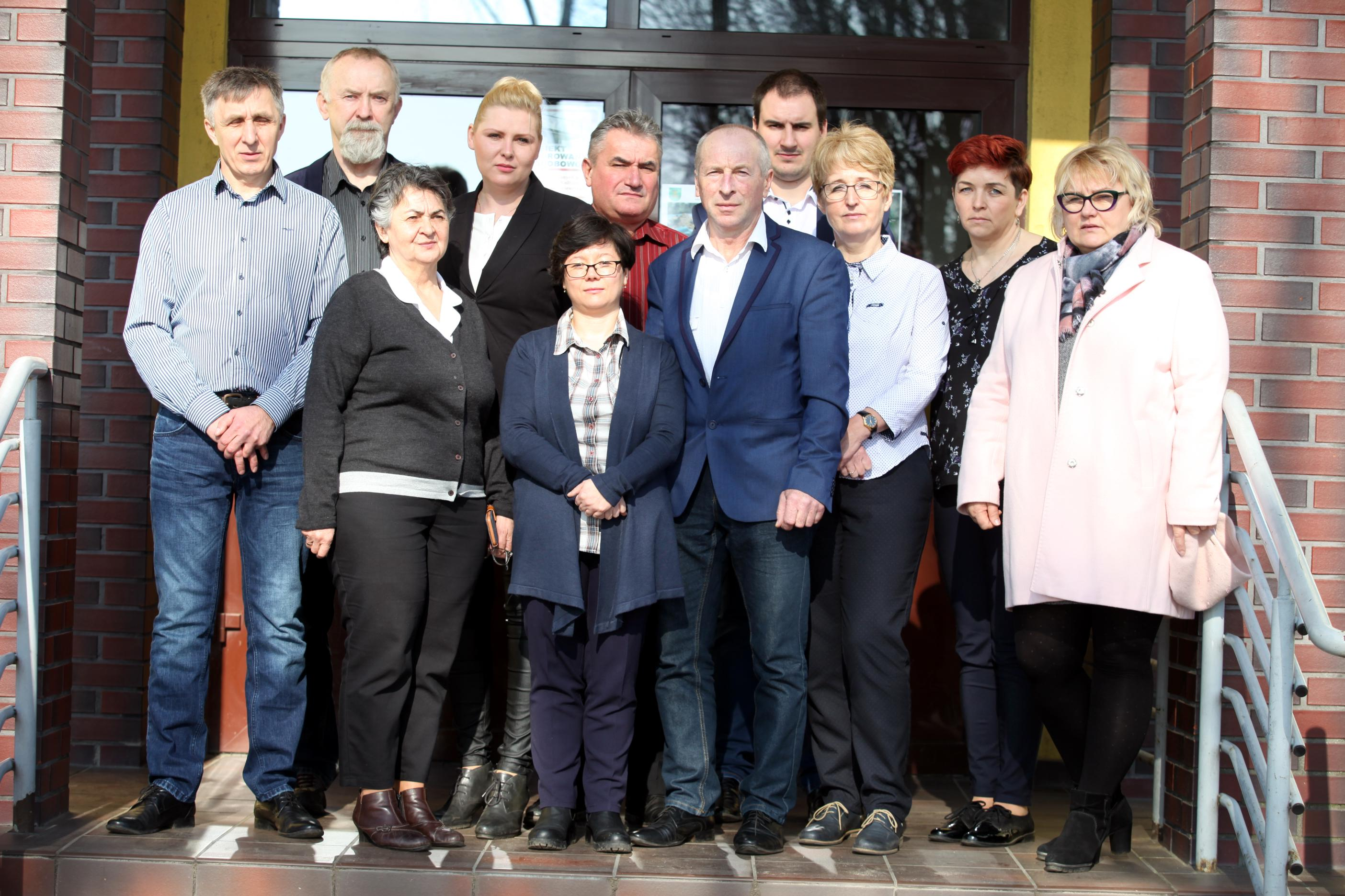 Sołtysi z terenu Gminy Kłodawa (kadencja 2018-2023)